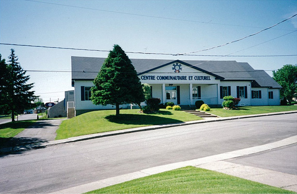 Bibliotheque municipale du village de Crabtree